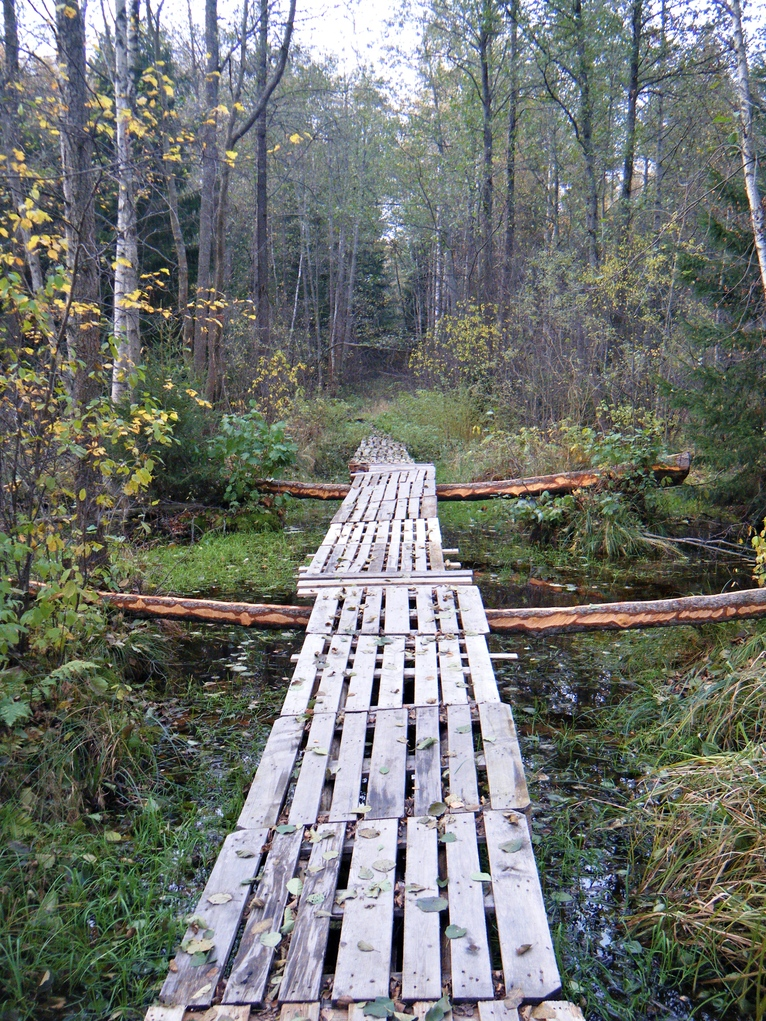 пешеходный мост через р. Дрезна